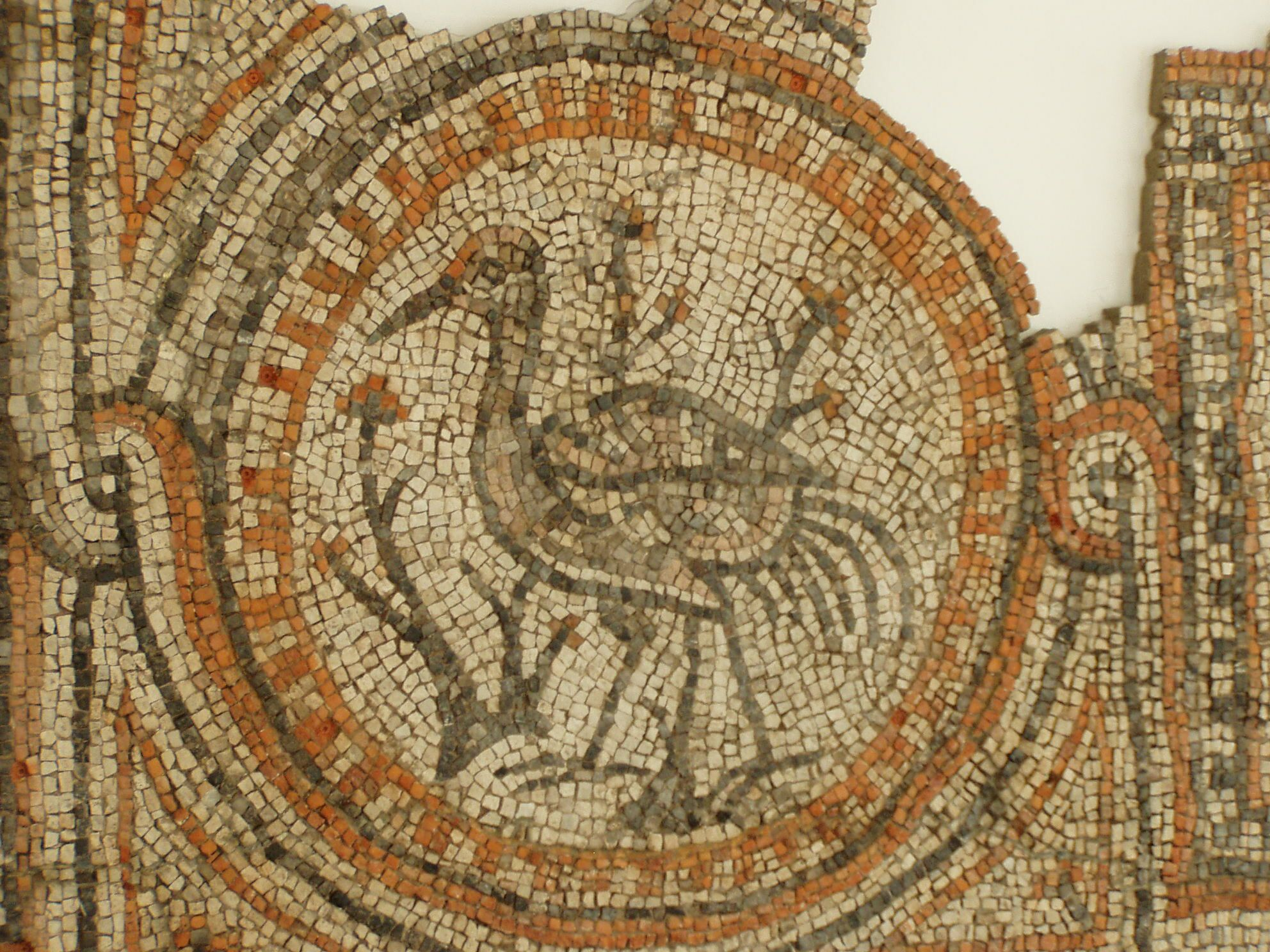 Hemmaberg, Carinthia. Östliche Doppelkirche, Gemeindekirche, Mosaik aus dem Eingangsbereich, Detail